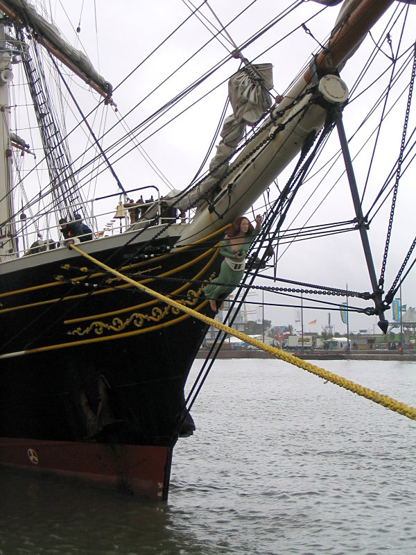 Galleonsfigur der Stad Amsterdam